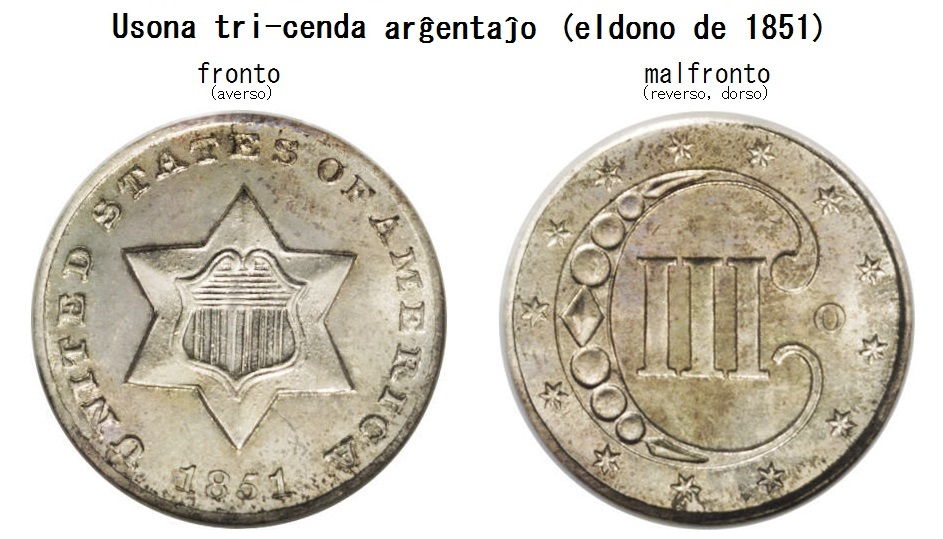 La usona tri-cenda arĝenta monero de 1851, montrante la fronton maldekstre kaj la dorson dekstre